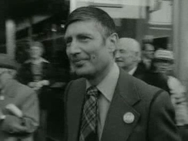 CDA-lijsttrekker Van Agt in 1977.